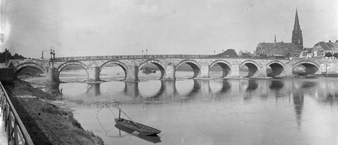 Maasbrug: Overzicht brug